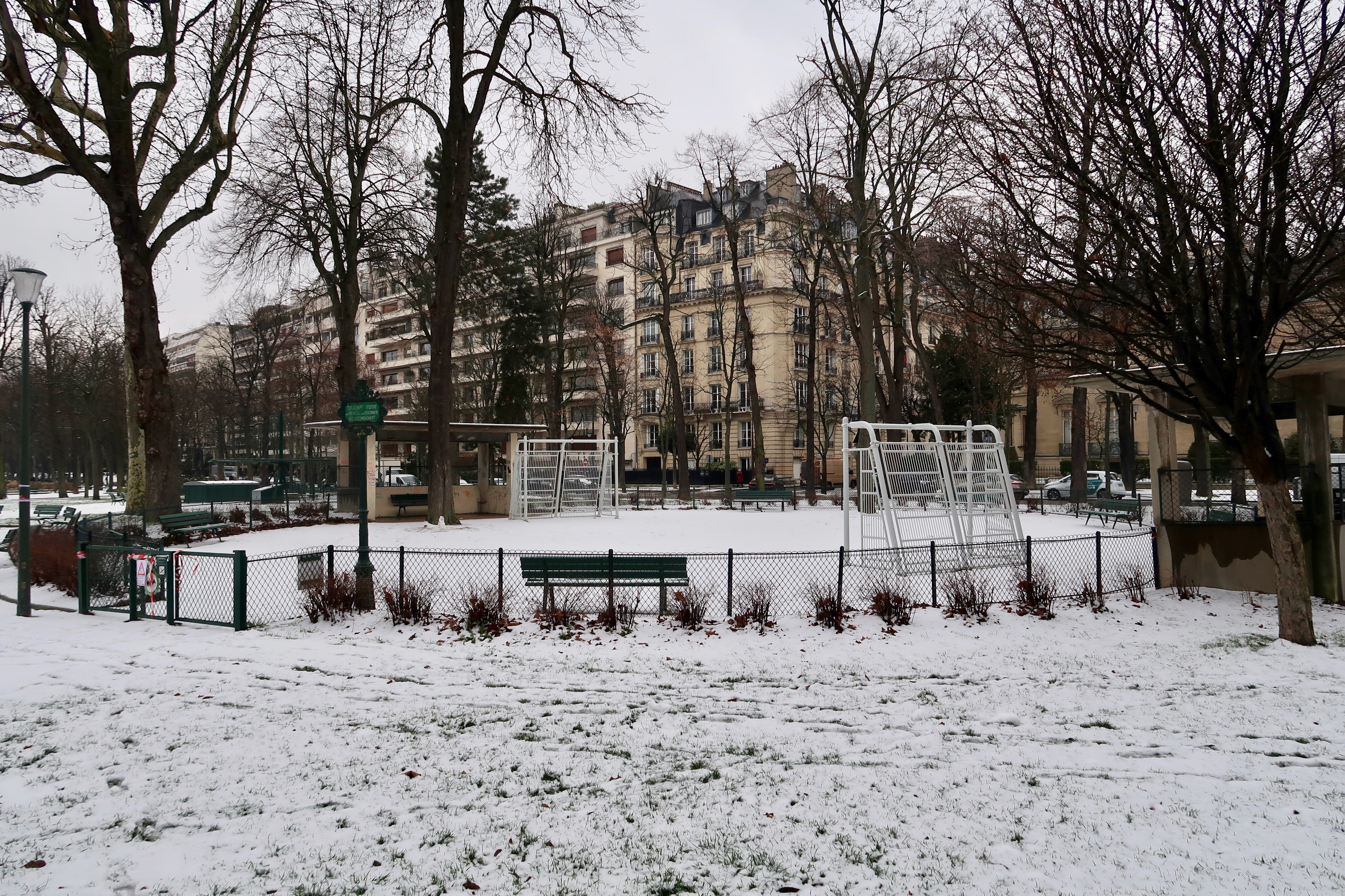 Terrain de jeu pour enfants dans le jardin du Ranelagh, sous la neige (Paris, 16e).